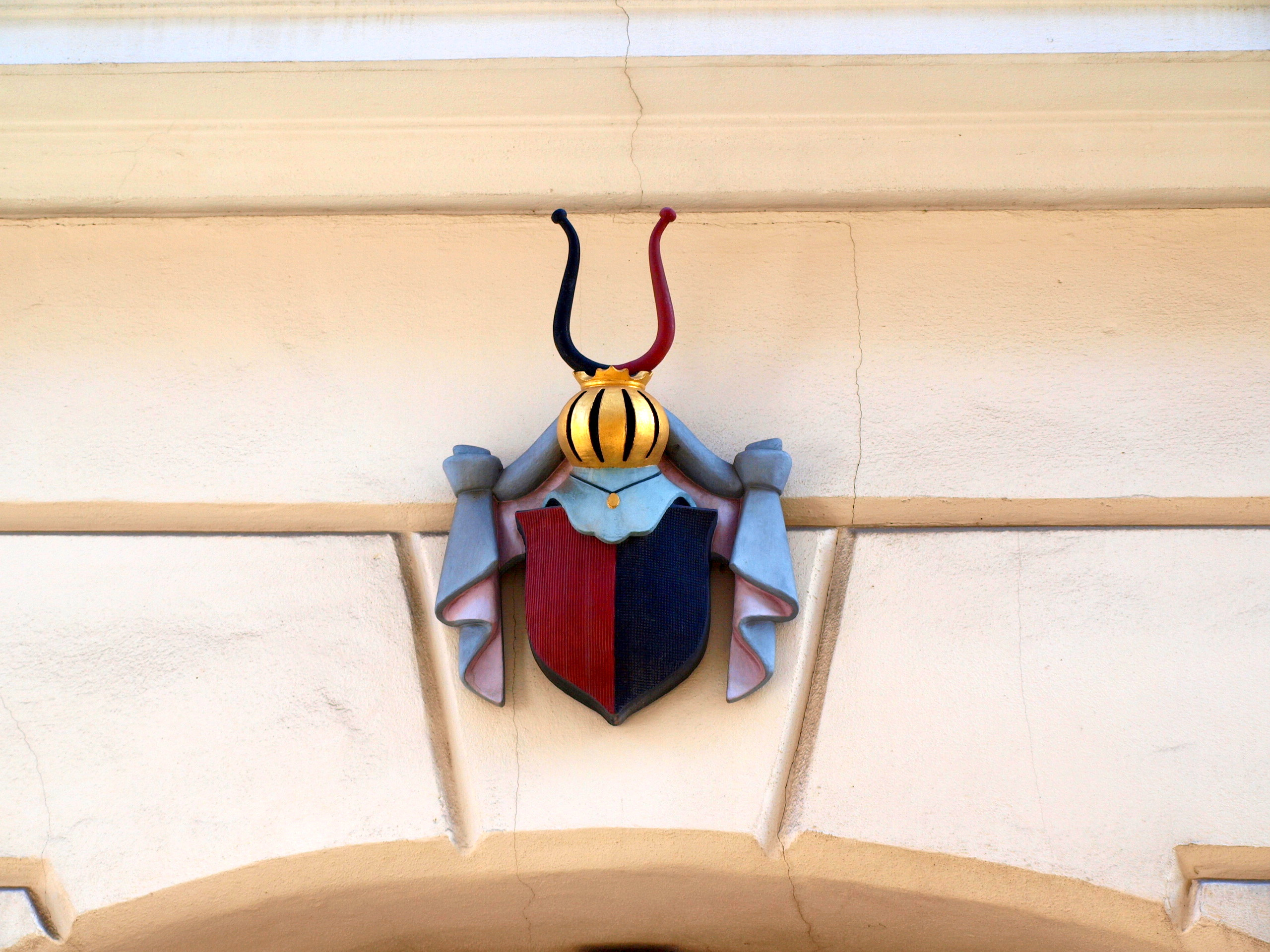 Vratislavský palác, Malá Strana